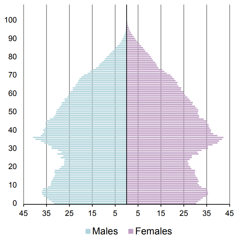 Половозрастная пирамида Ирландии 2016